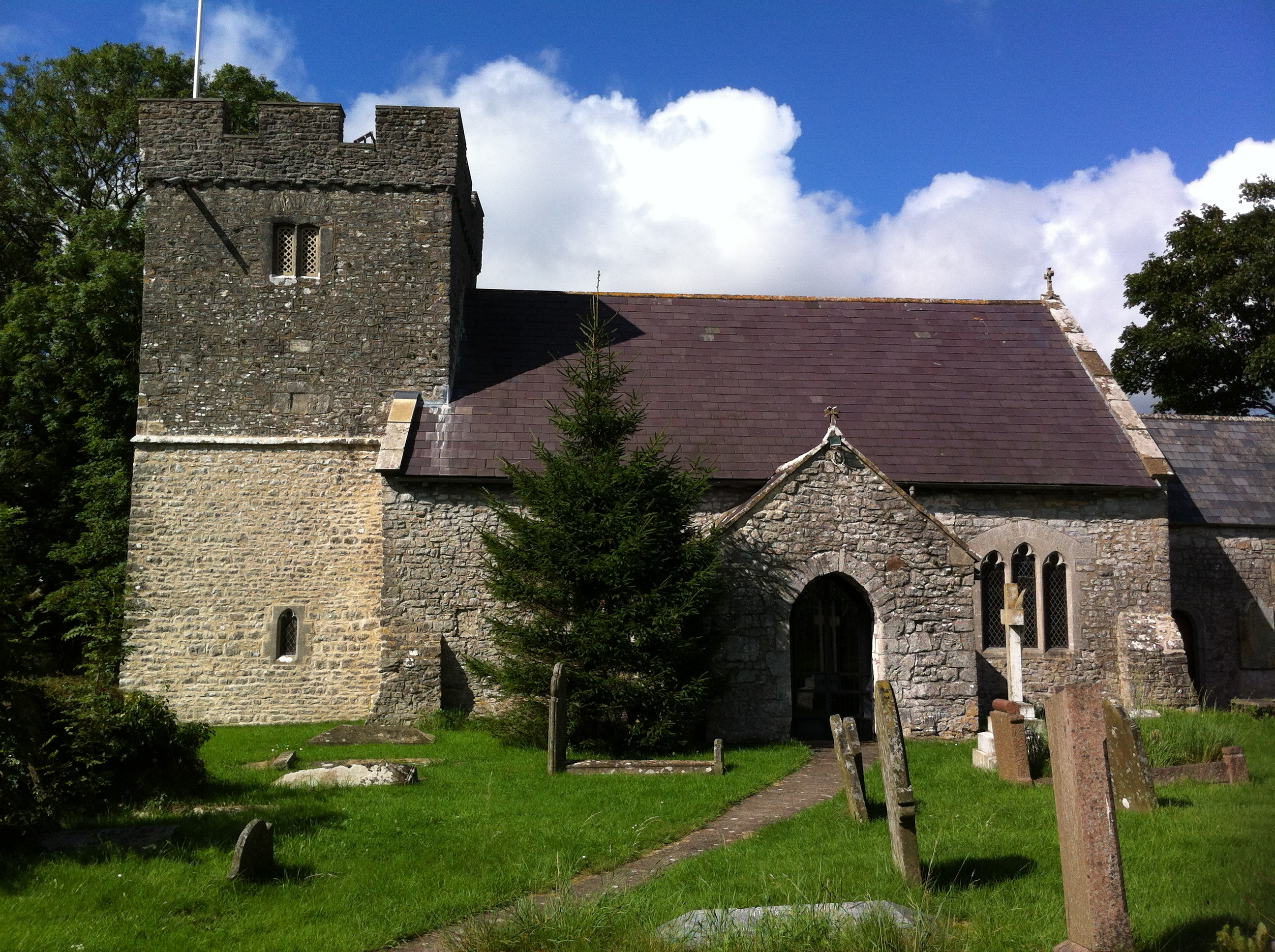 Welsh St. Donats